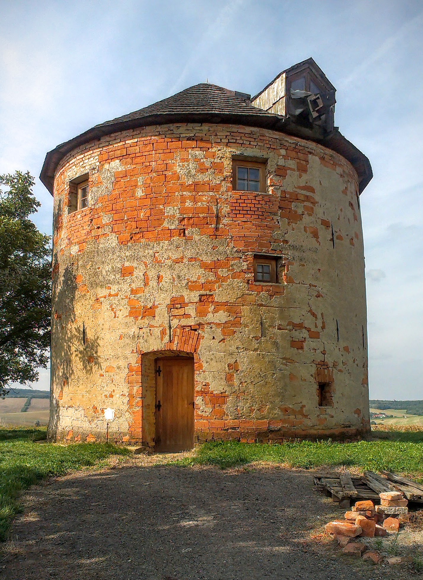 Větrný mlýn, Kunkovice.